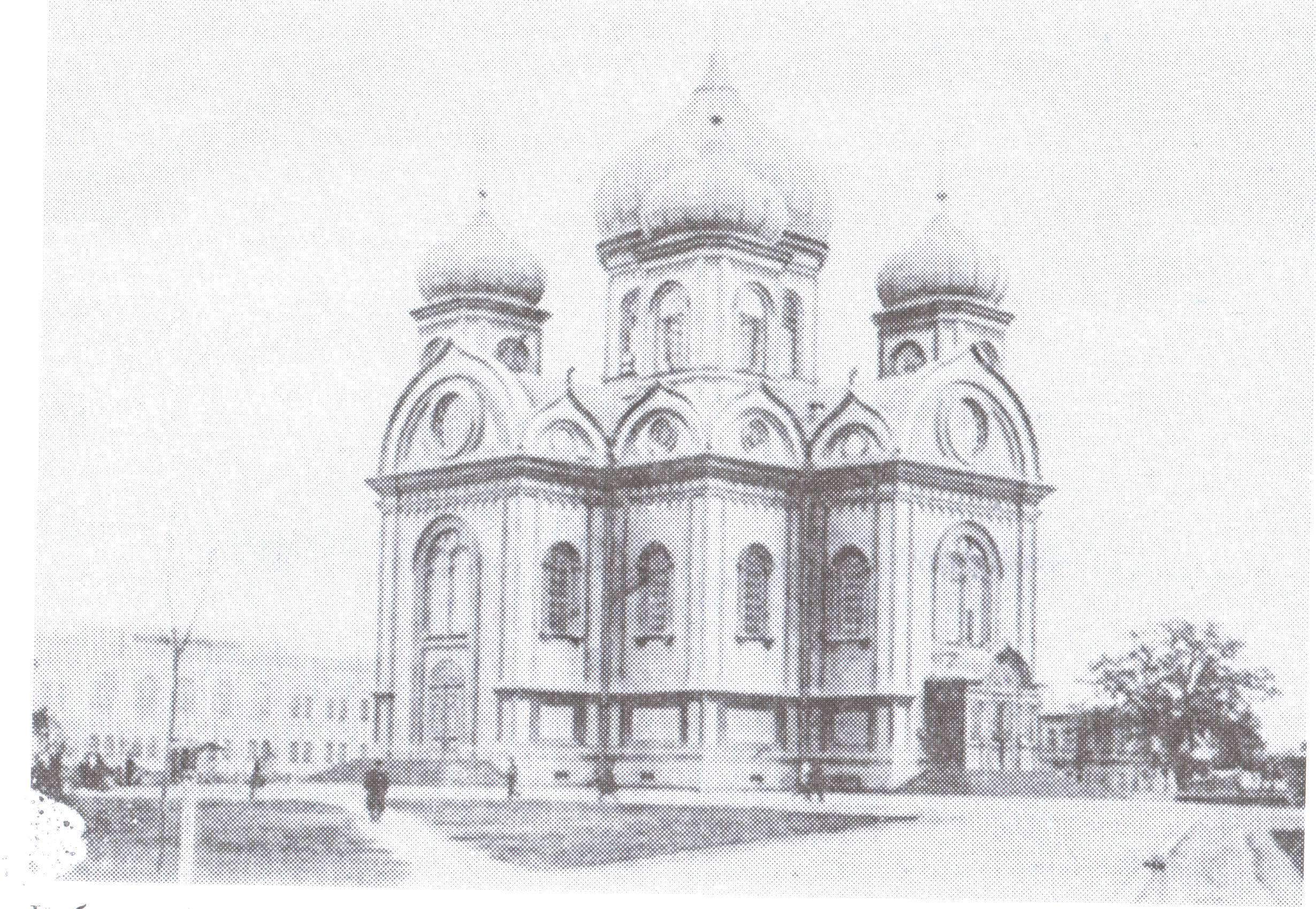 Кубанский войсковой собор Святого Александра Невского, где первоначально был похоронен М.Г. Дроздовский